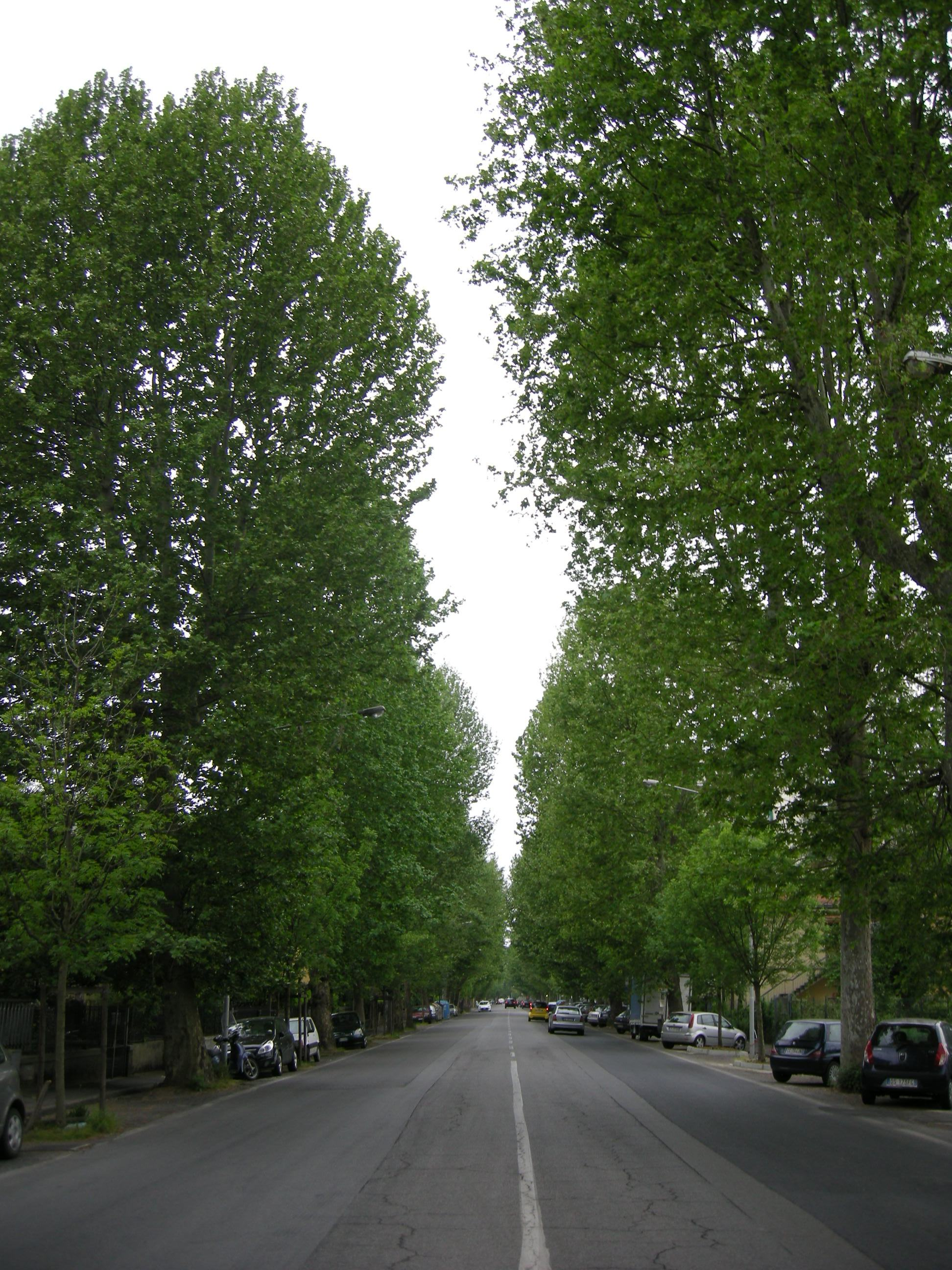 Via pistoiese, firenze